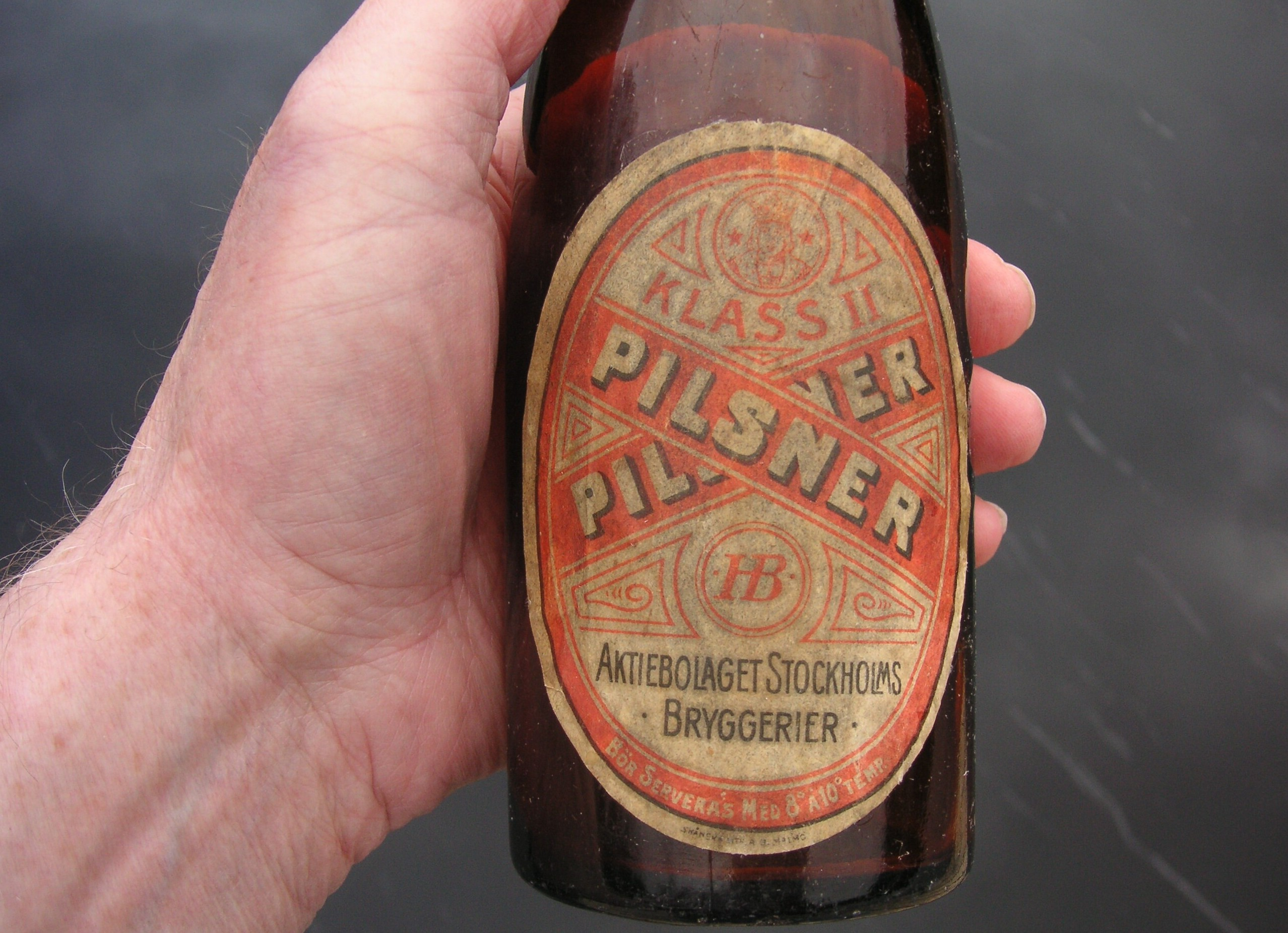 En ölflaska från Hamburgerbryggeriet som ingick i AB Stockholms Bryggerier